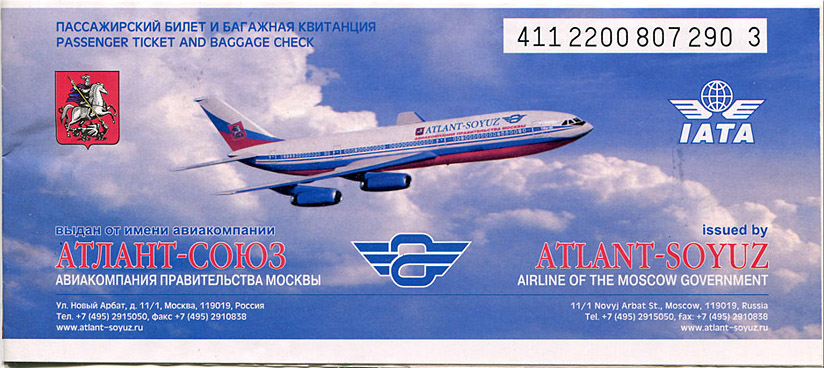 Авиабилет